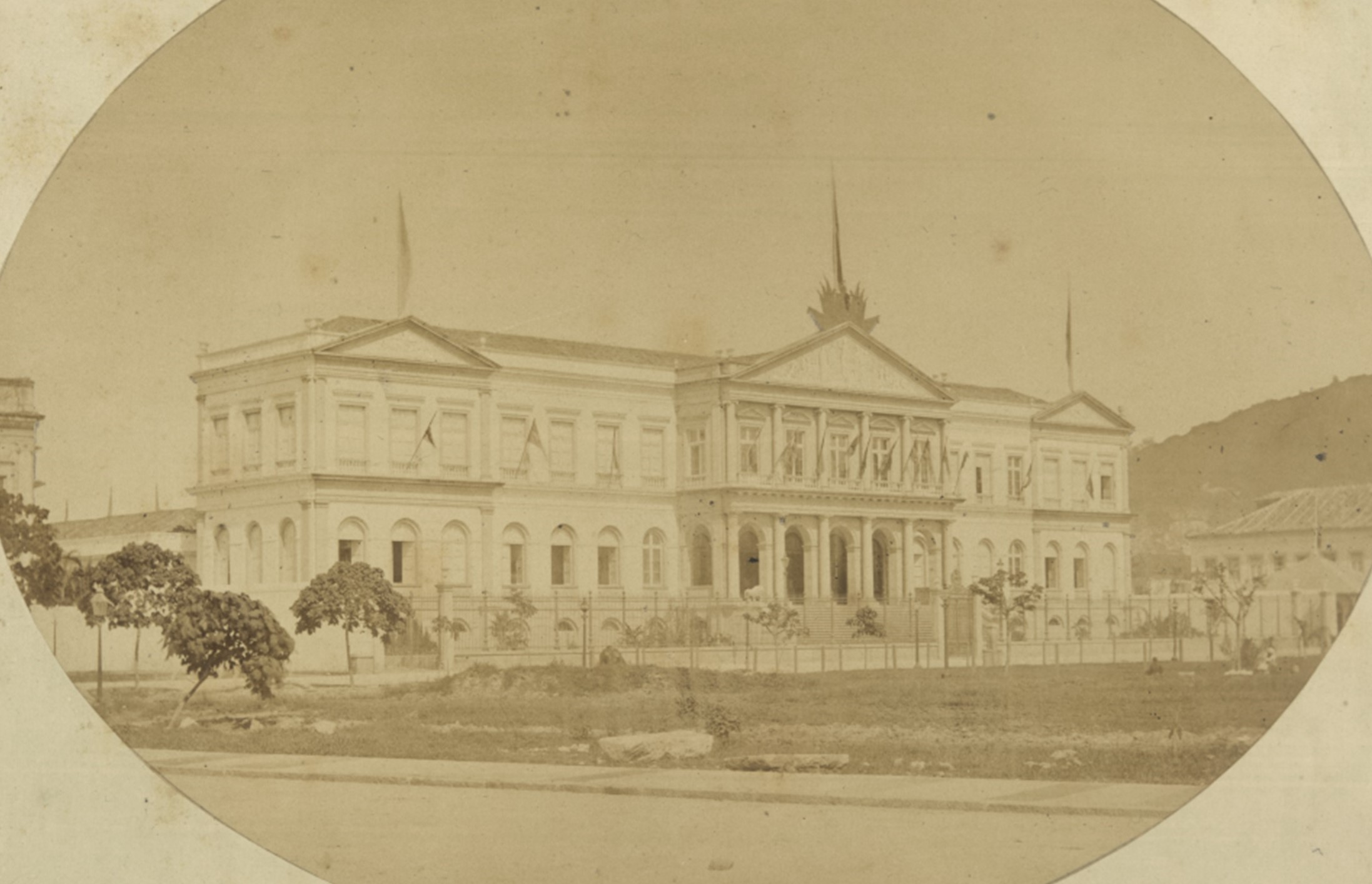 Casa da Moeda, atual sede do Arquivo Nacional, Rio de Janeiro, quando abrigou a Exposição Nacional. Fundo: Fotografias Avulsas.